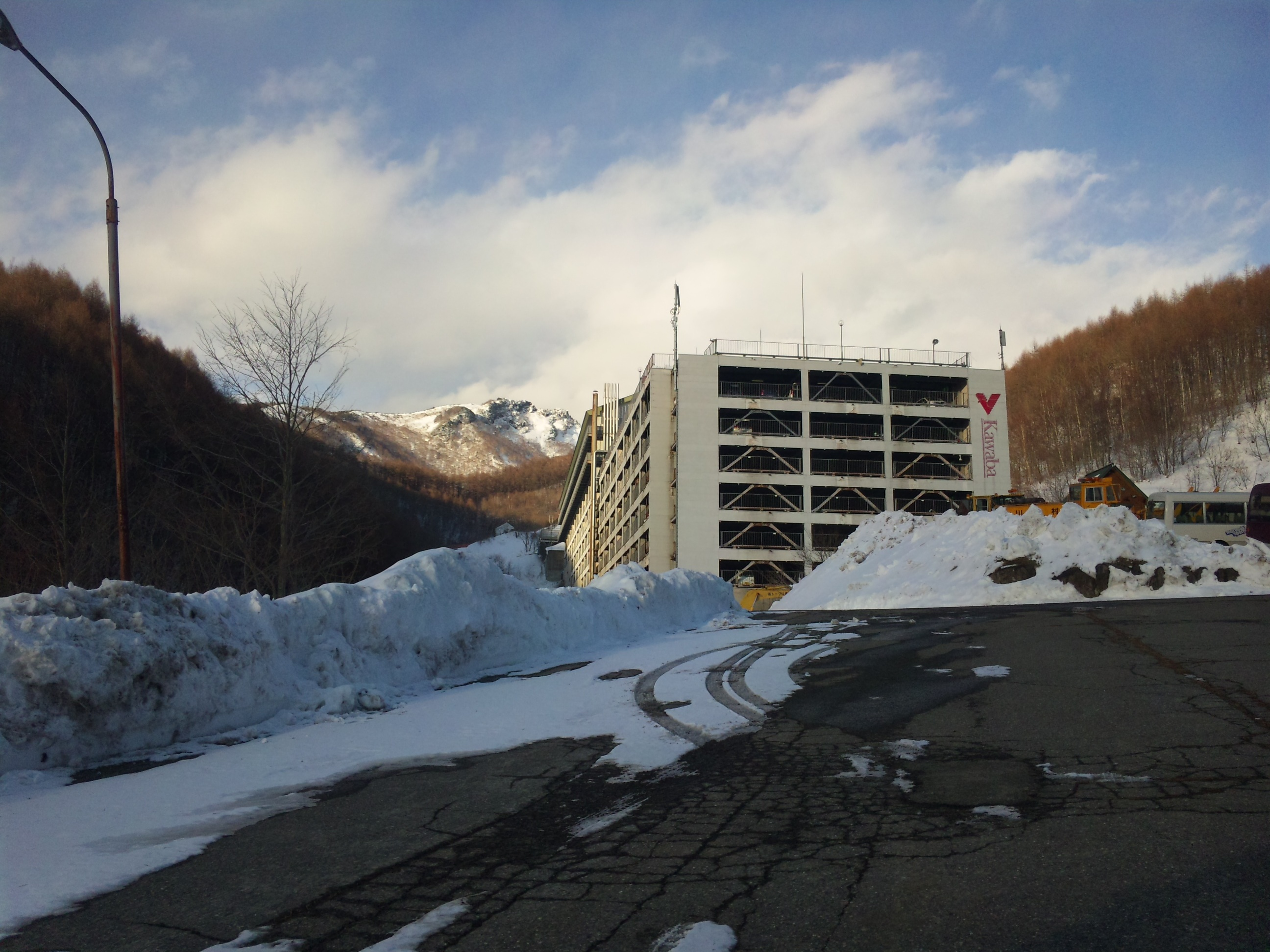 川場スキー場駐車場